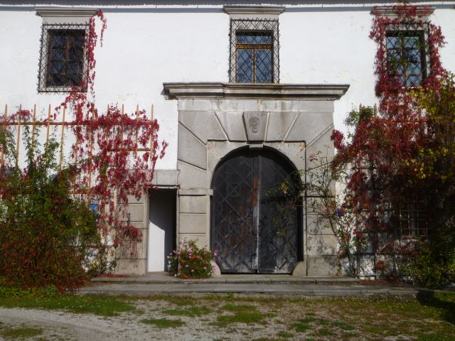 Schloss Haiding - Eingangsportal von 1604